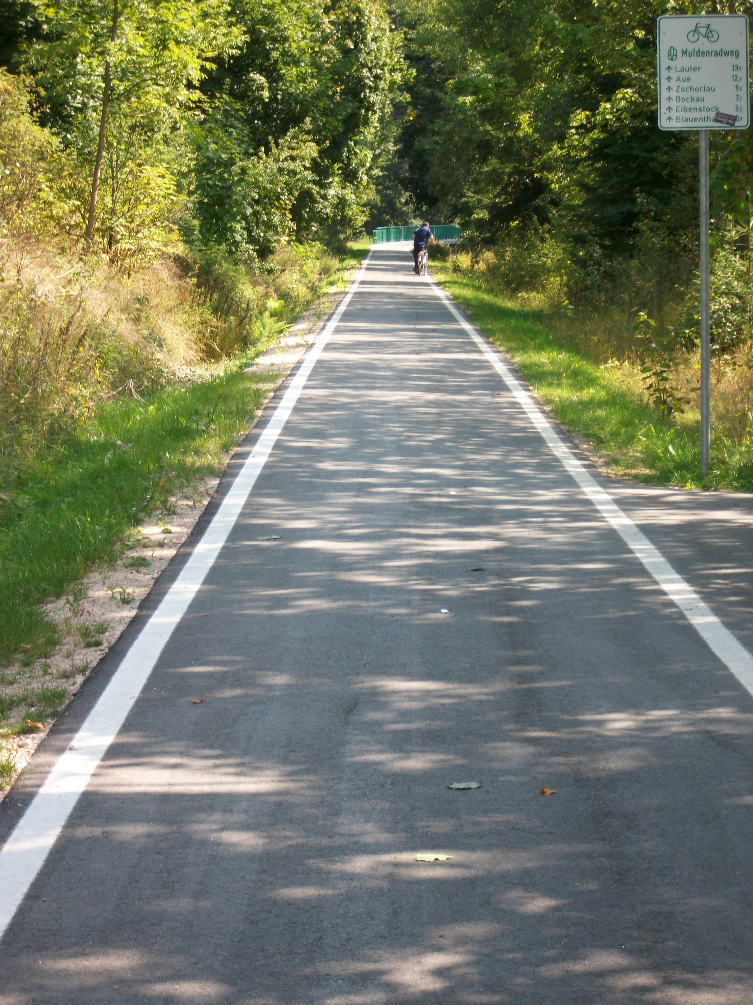 Muldentalradweg bei Wolfsgrün (2013)